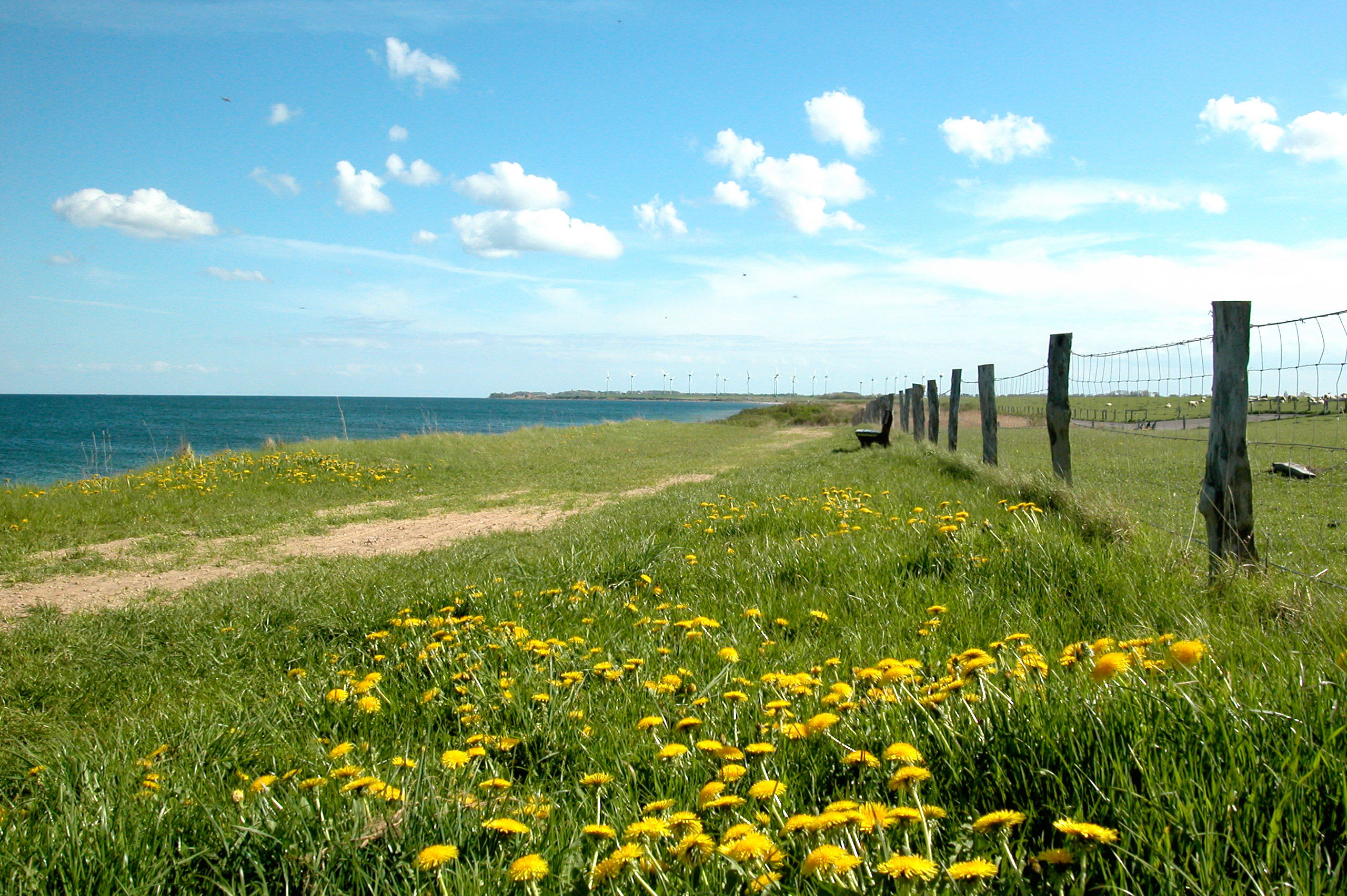 Nord-Ost-Strand